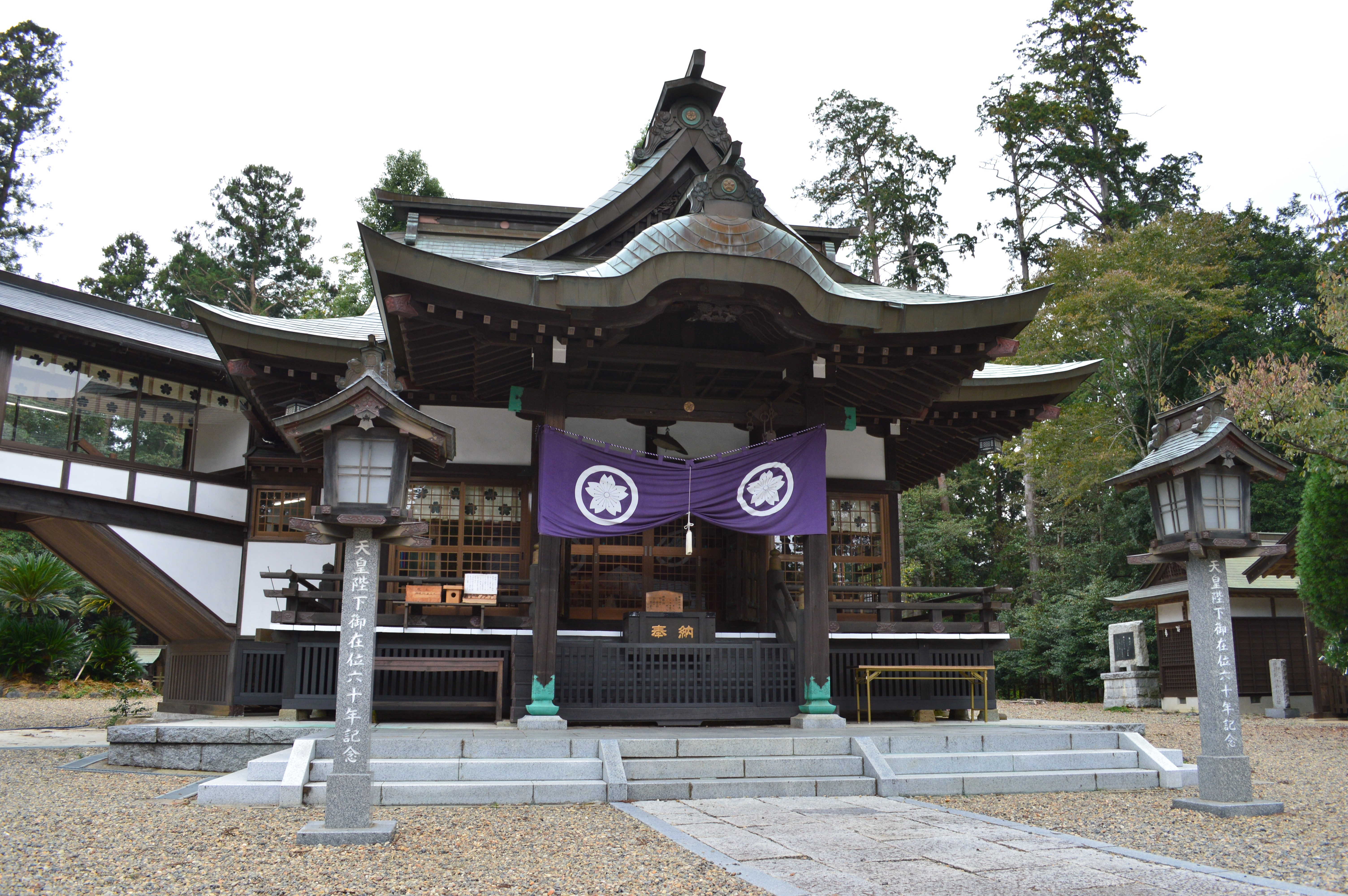 静神社 (那珂市) 拝殿